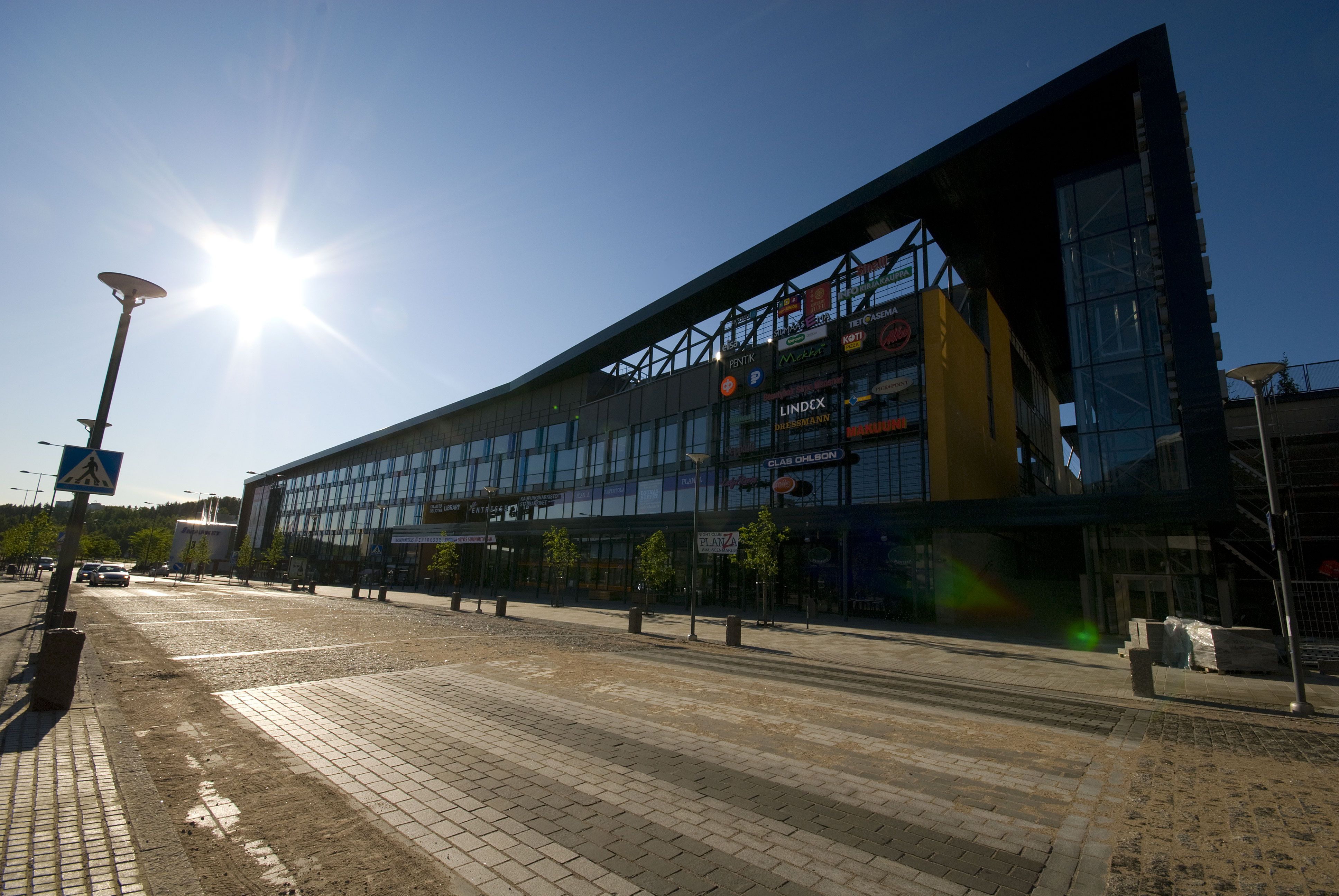 Entresse